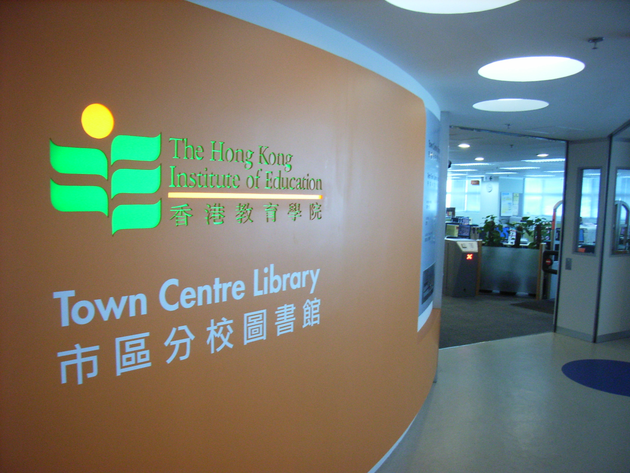 浪澄灣 (The Long Beach)，是zh:香港zh:西九龍一個臨海私人屋苑，位於zh:九龍zh:海輝道8號，九龍內地段11152號，共有8幢，1,829個物業單位，由zh:恆隆地產發展。 在浪澄灣的基層，已經入伙的有zh:香港教育學院持續專業教育學部的課室及zh:圖書館，此學苑的zh:獨立正門入口面向西，望海濱公園及碼頭方向。 Photo by User:OLAMB